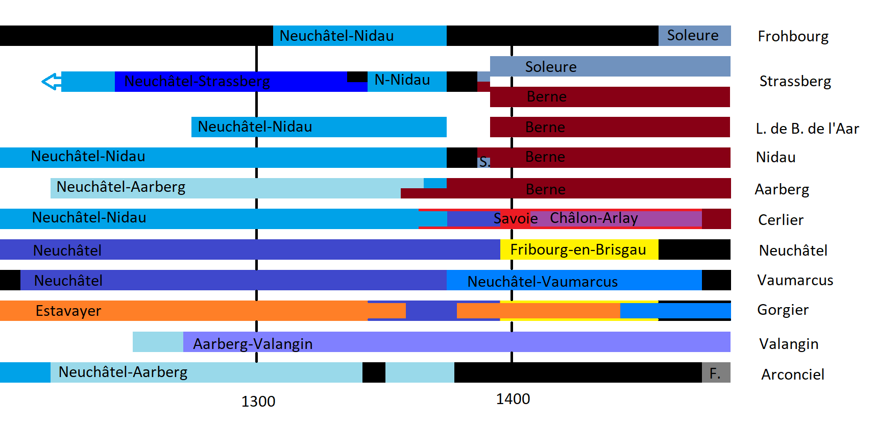 Infographie montrant les possessions des différentes branches de la maison de Neuchâtel